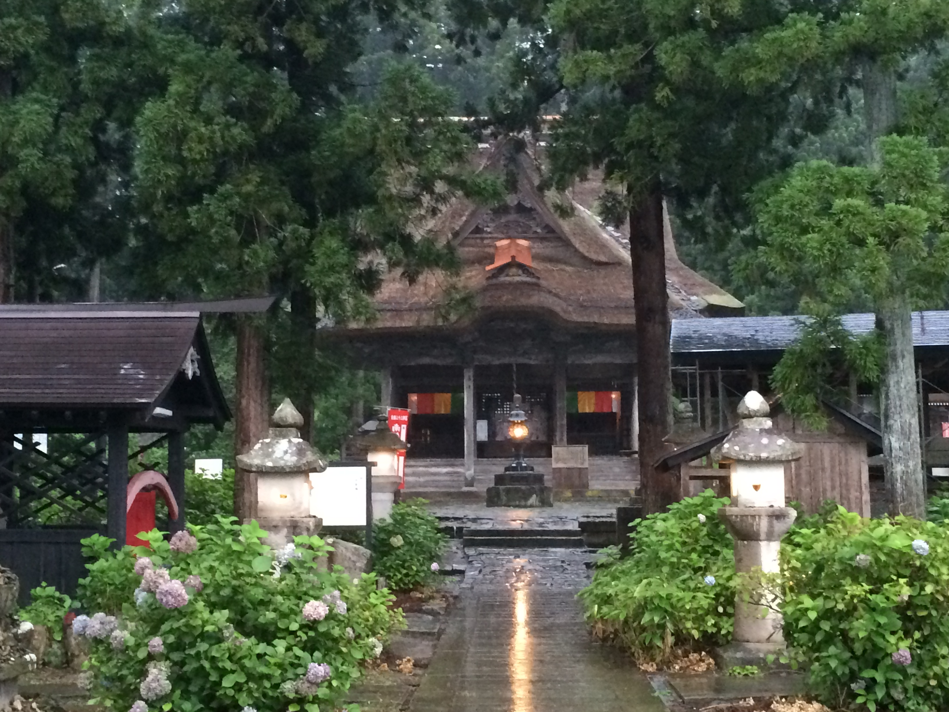 Sasano Kannon-do Hall(笹野観音堂)